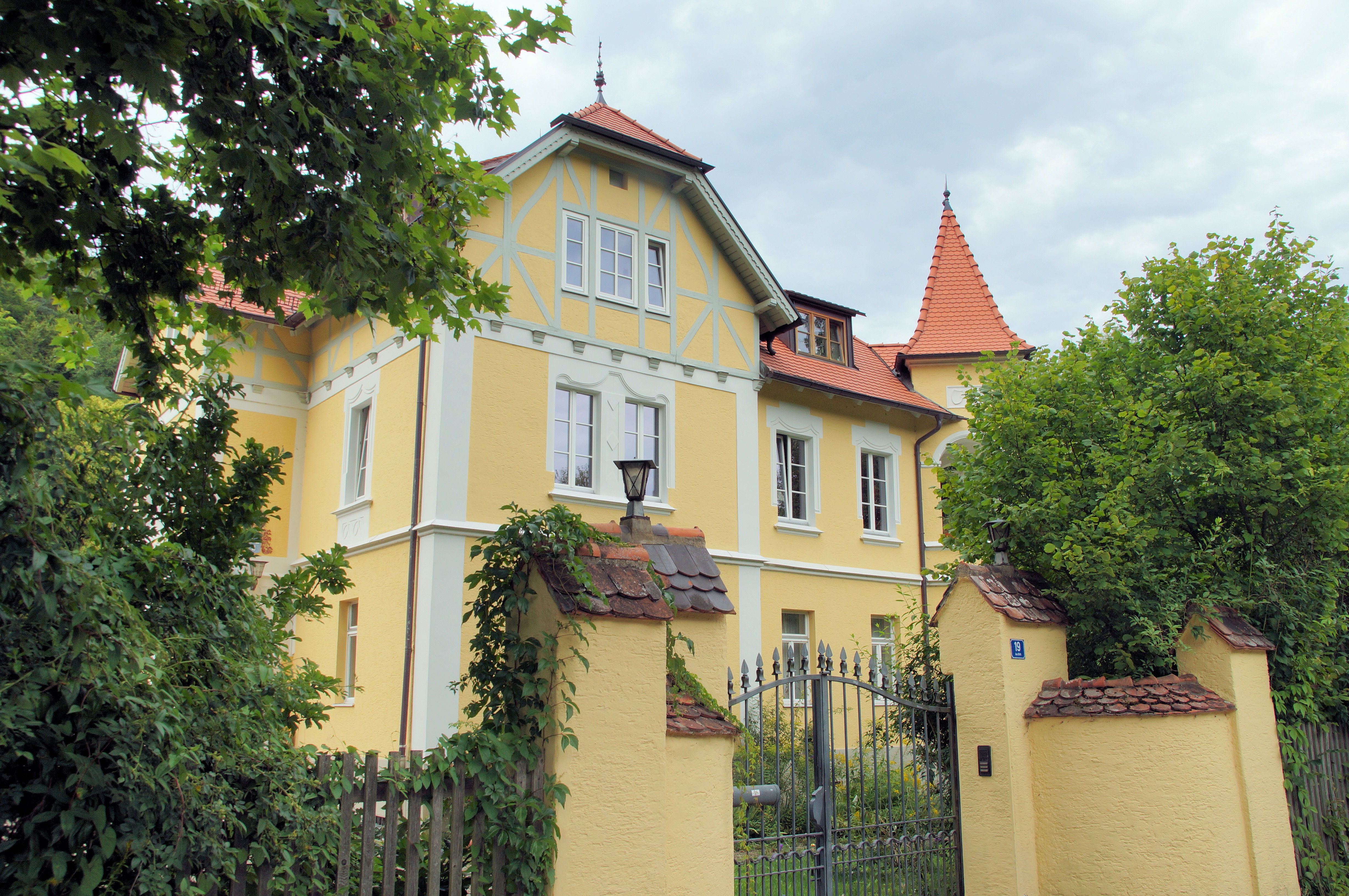 Villa in Alling, sogenanntes Gelbes Haus, zweigeschossiger und gegliederter Walmdachbau mit Treppenhausrisalit, Krüppelwalmdächern, Fachwerk und Putzgliederungen, Jugendstil, Ende 19. Jahrhundert This is a photograph of an architectural monument.